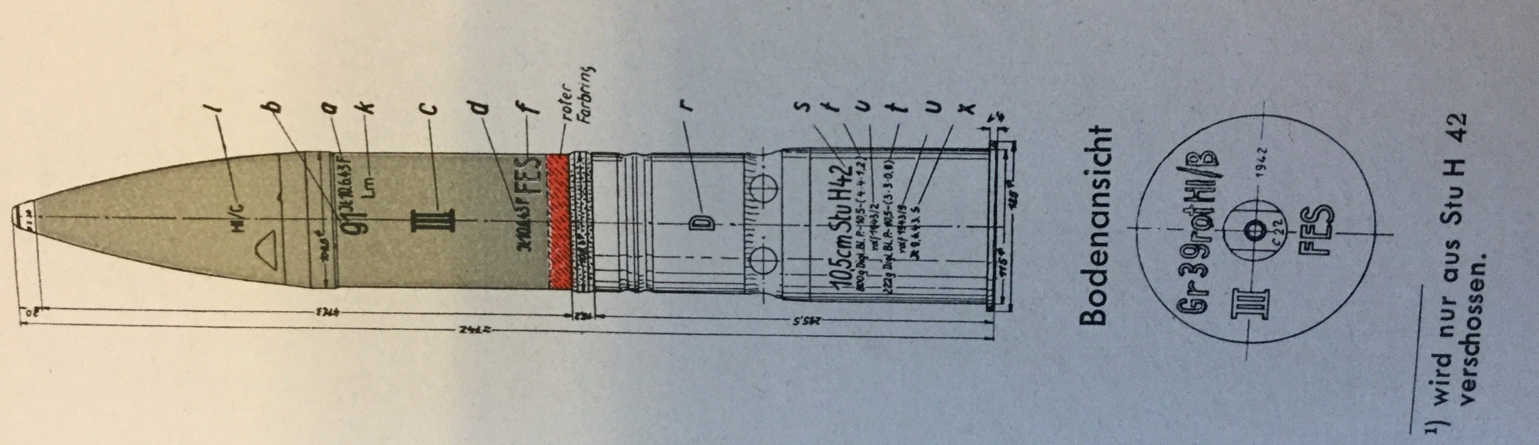 Эскиз унитарного патрона к 10,5 cm StuH 42 из германских таблиц стрельбы для 10,5-см самоходных гаубиц, сент. 1943 г.